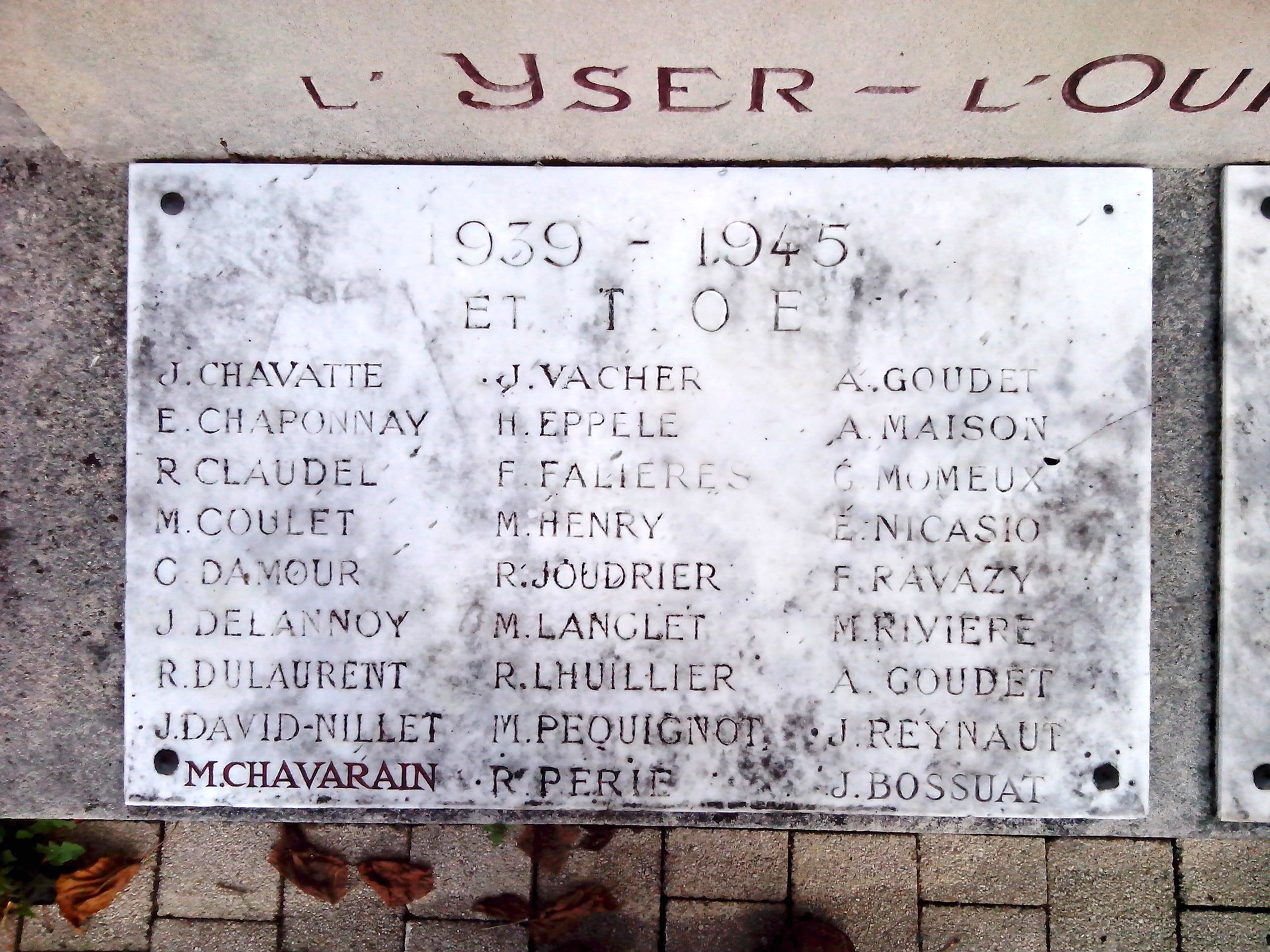 Plaque commémorative sur le monument aux morts de Crosne, en Essonne. On y lit notamment le nom de Jean David-Nillet, fait prisonnier lors de l'embuscade de Palestro du 18 mai 1956 et mort lors de l'assaut de l'armée pour le libérer.